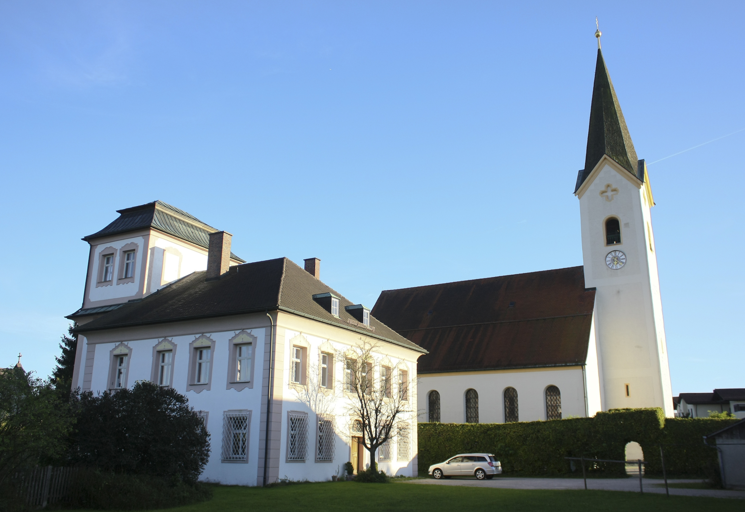 Kath. Filialkirche St. Mariä Himmelfahrt, erbaut als einschiffige Anlage im 17. Jh., südliches Seitenschiff 18. Jh., nördliches um 1840; mit Ausstattung. This is a photograph of an architectural monument.